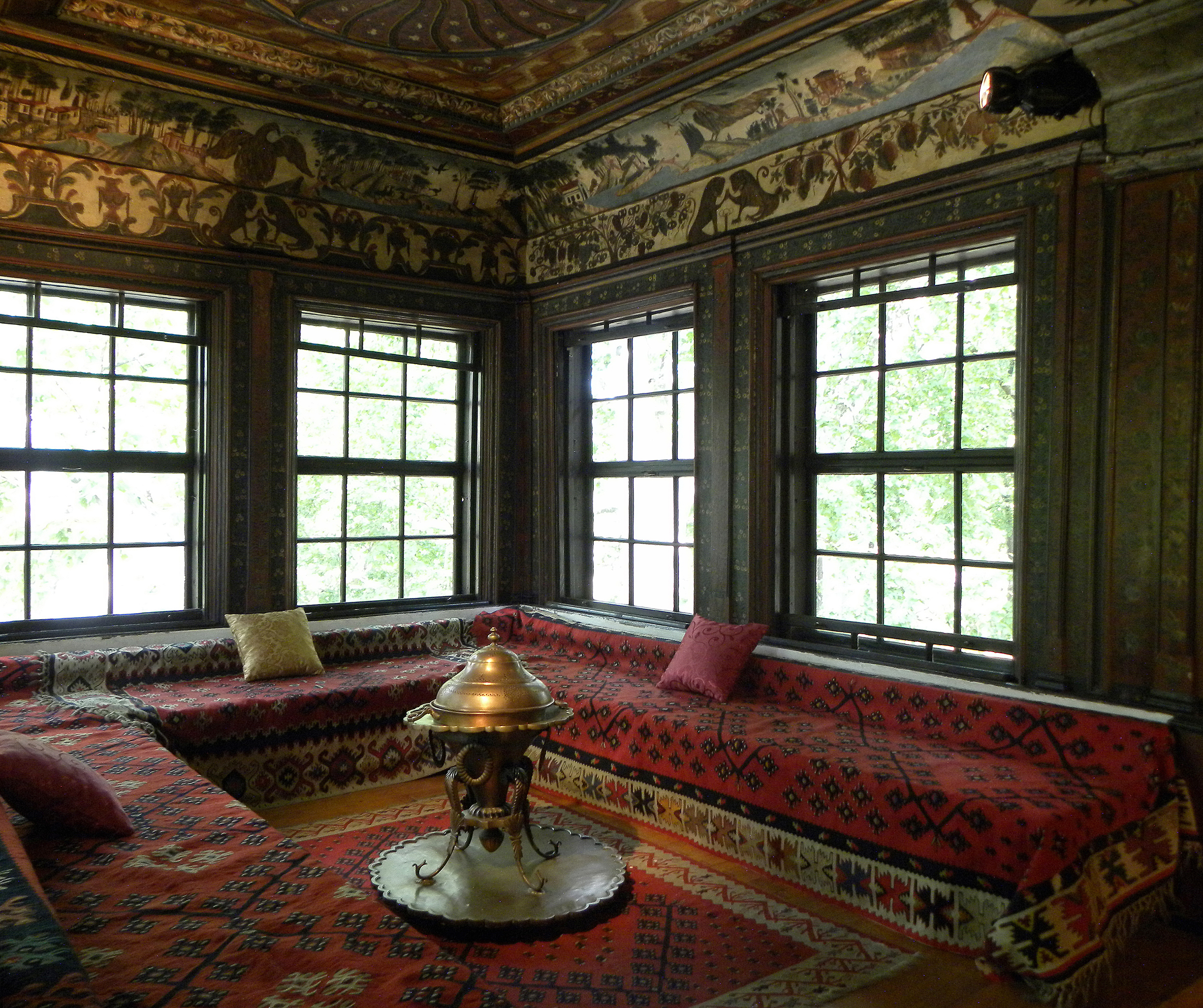 Beograd Konak kneza Miloša